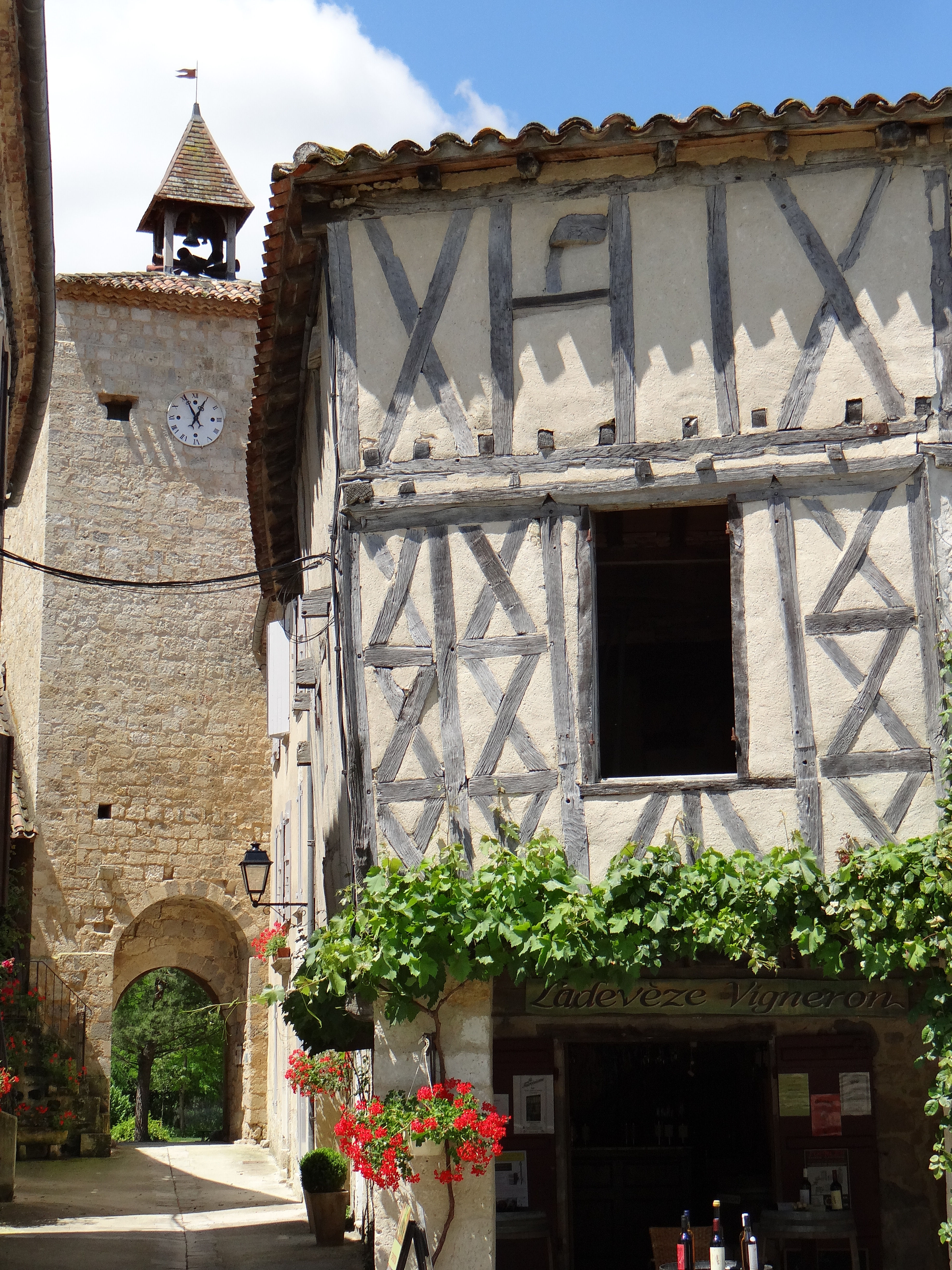 Fourcès - Porte de ville - Côté village